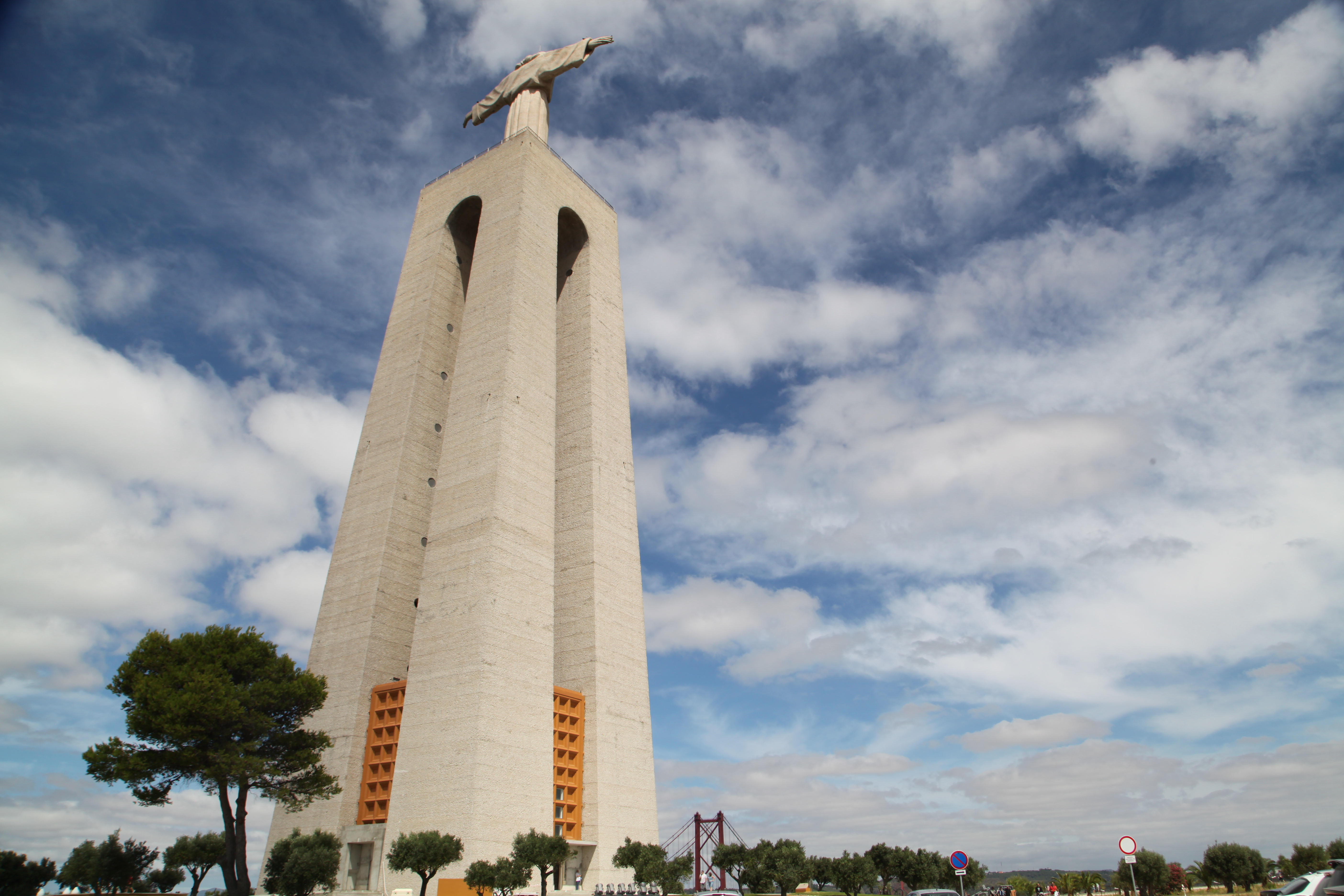 Lisbonne